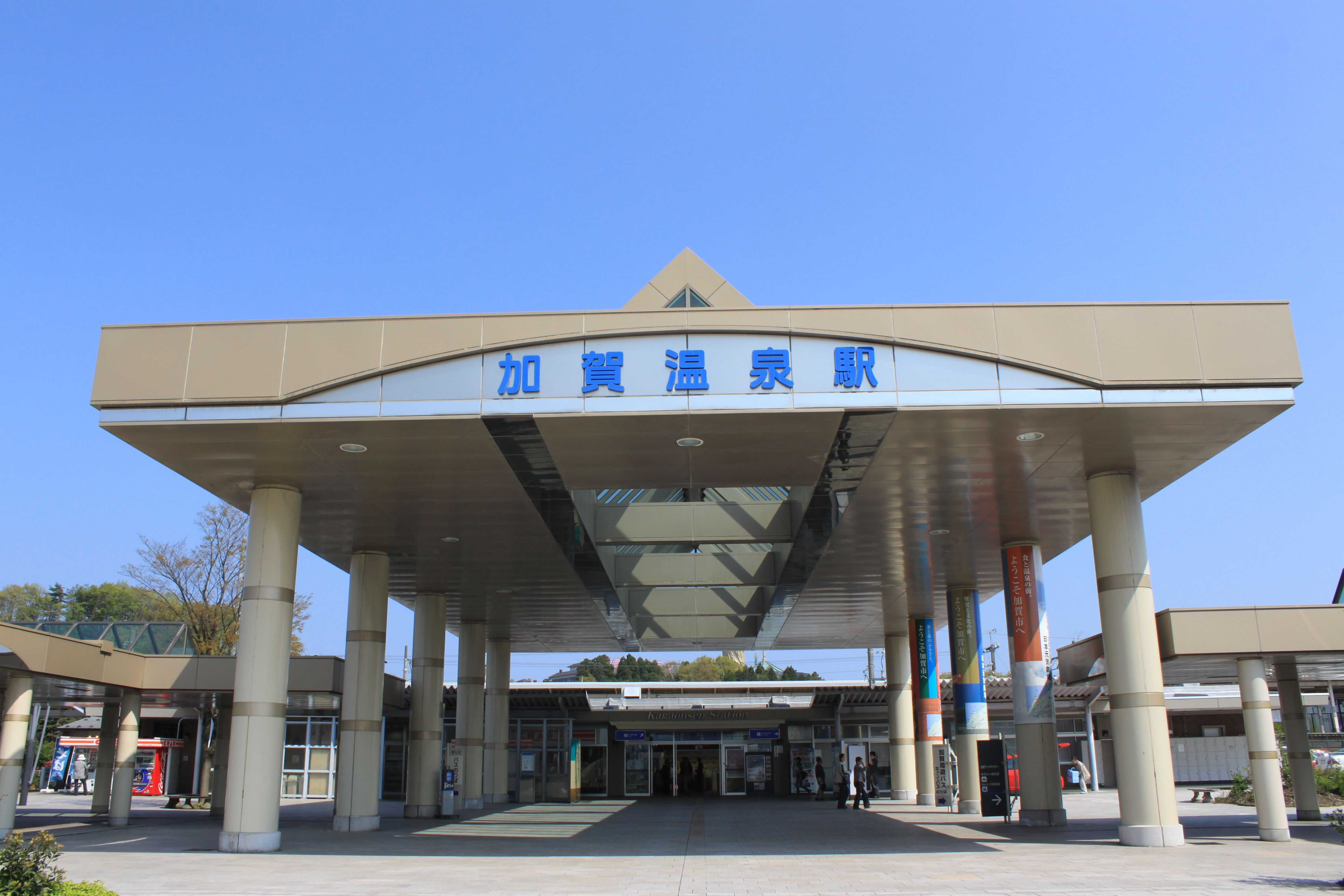 加賀温泉駅